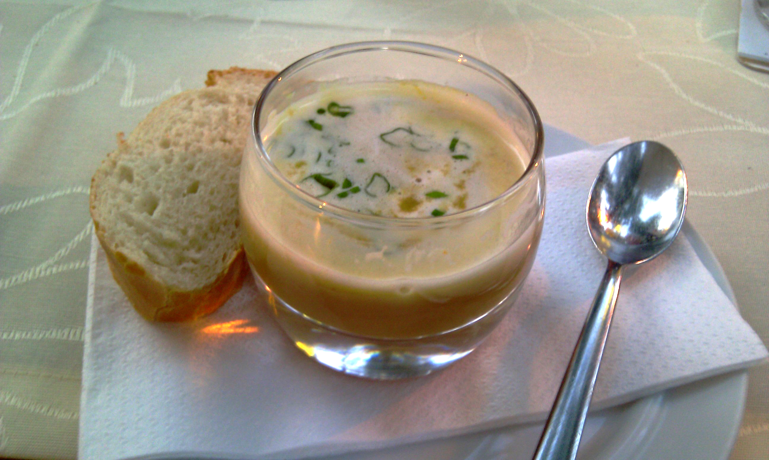 Apfelrahmsuppe mit Curry und Schnittlauch, Restaurant "Kanzlei", Dresden, Sachsen